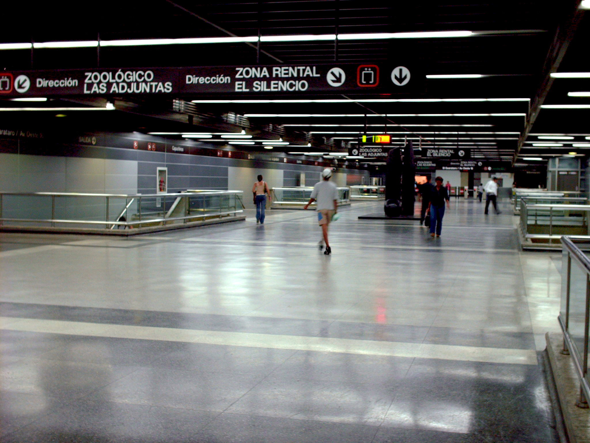 Estación Capuchinos, L2 Metro Caracas